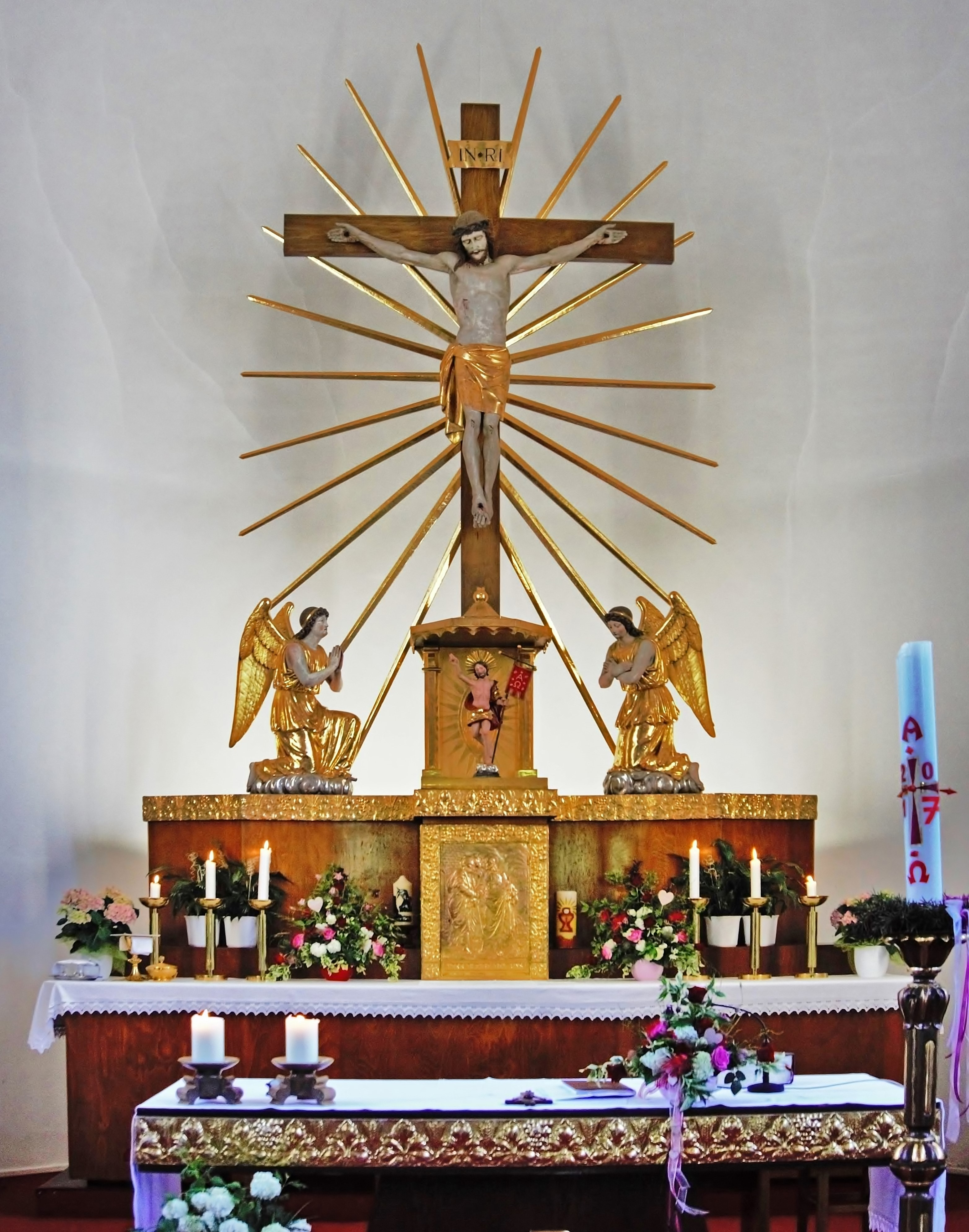 Altar der neuen kath. Pfarrkirche Hl. Josef in Bodensdorf am Ossiacher See